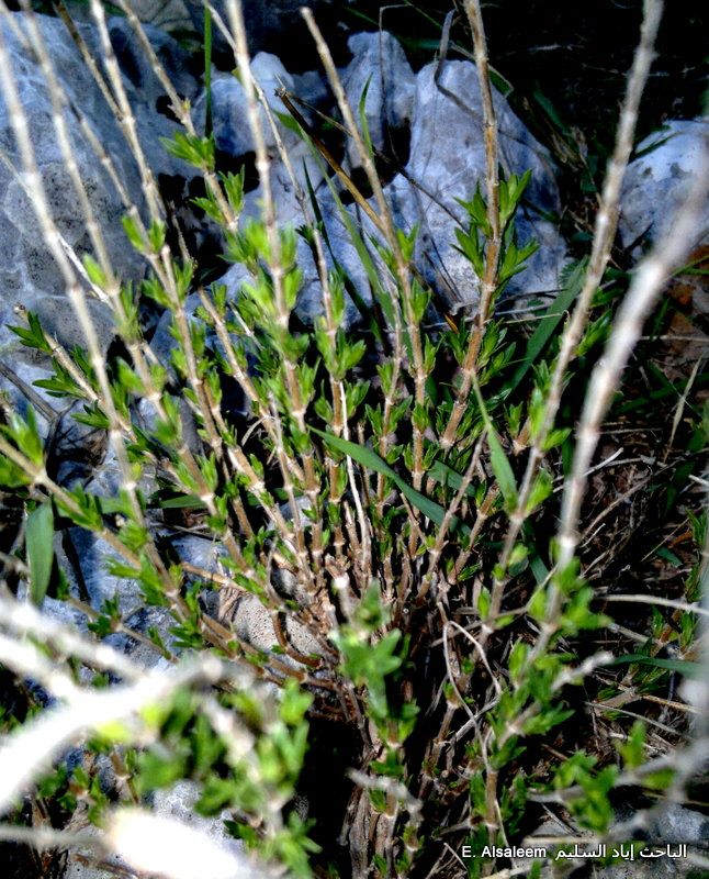 نباتات برّية سورية تؤكل